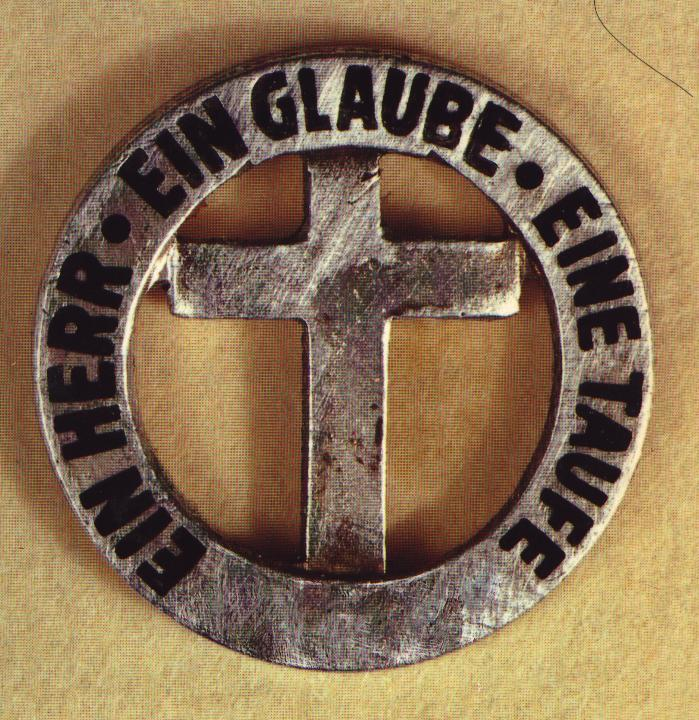 Historische Anstecknadel mit biblischem Logo der deutschen Baptisten - Ein Herr, Ein Glaube, Eine Taufe Antiguo prendedor bautista alemán con la consigna bíblica que los caracteriza - Un Señor, Una Fe, Un Bautismo. Engl.: One Lord, one faith, one baptism (Eph. 4,5)